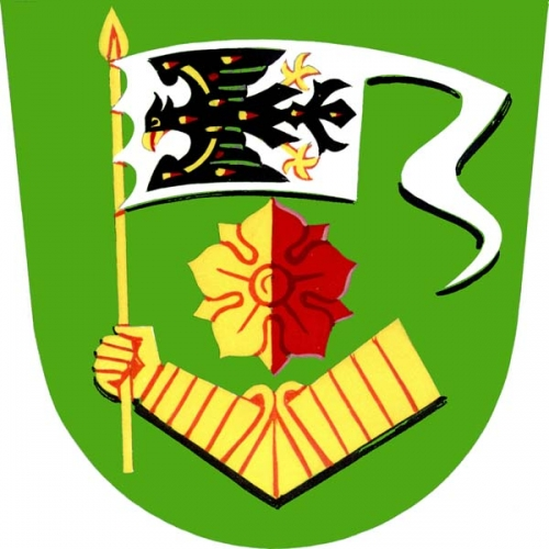 znak,Mackovice , okres Znojmo